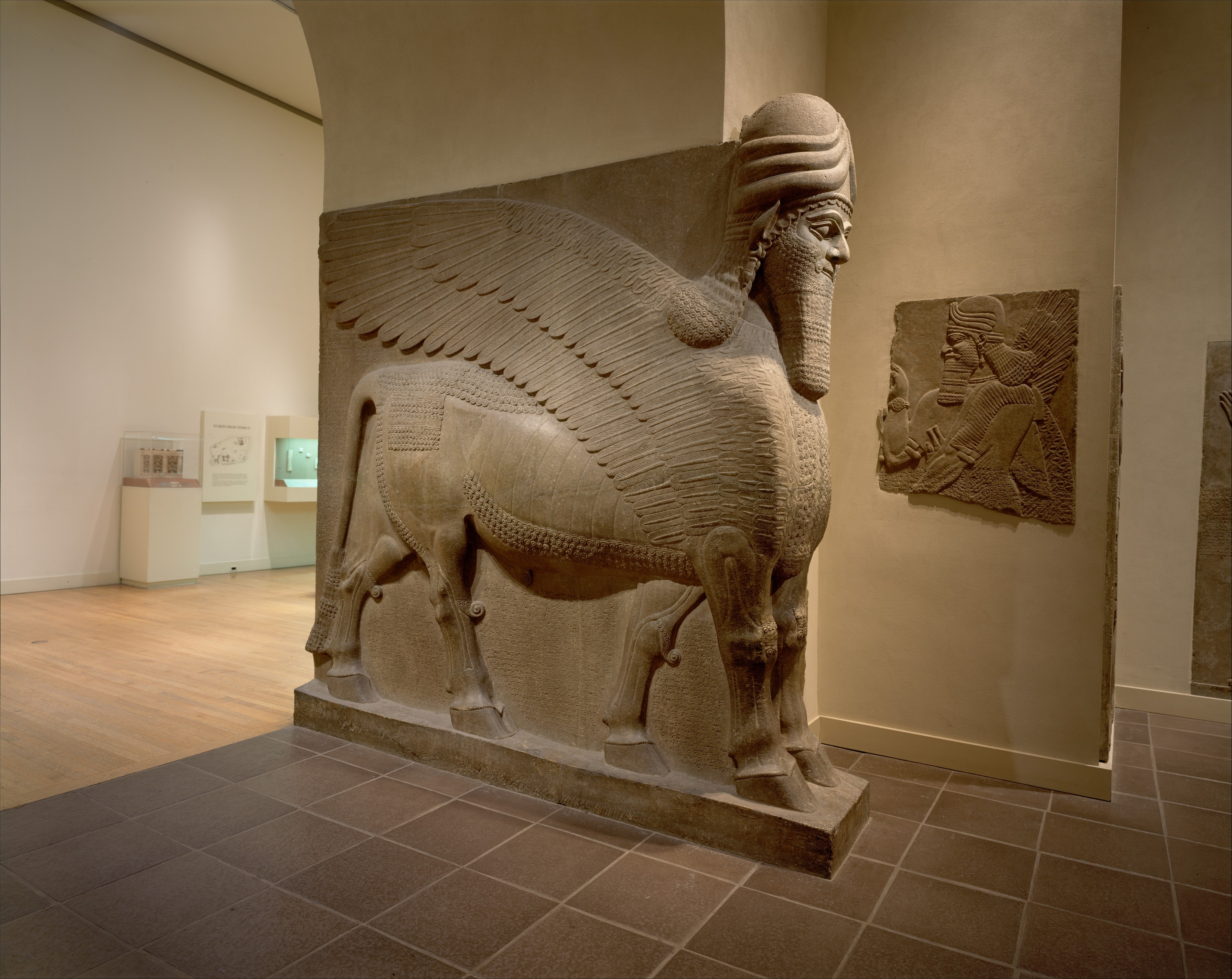 Assyrian; Relief; Stone-Reliefs-Inscribed